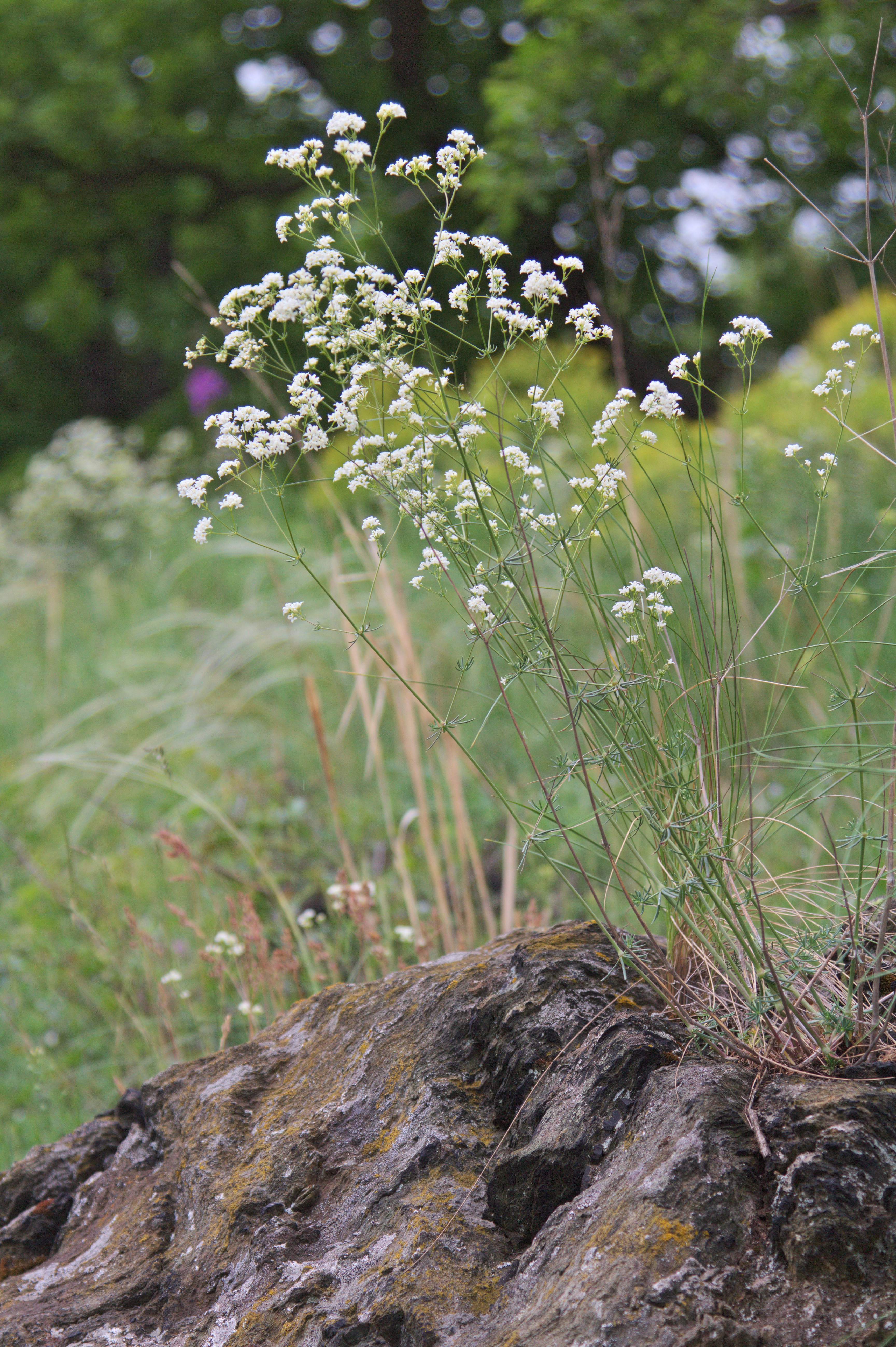 Kalvárie (přírodní rezervace) - jaro - Galium glaucum L., svízel sivý - status ohrožení v ČR: není